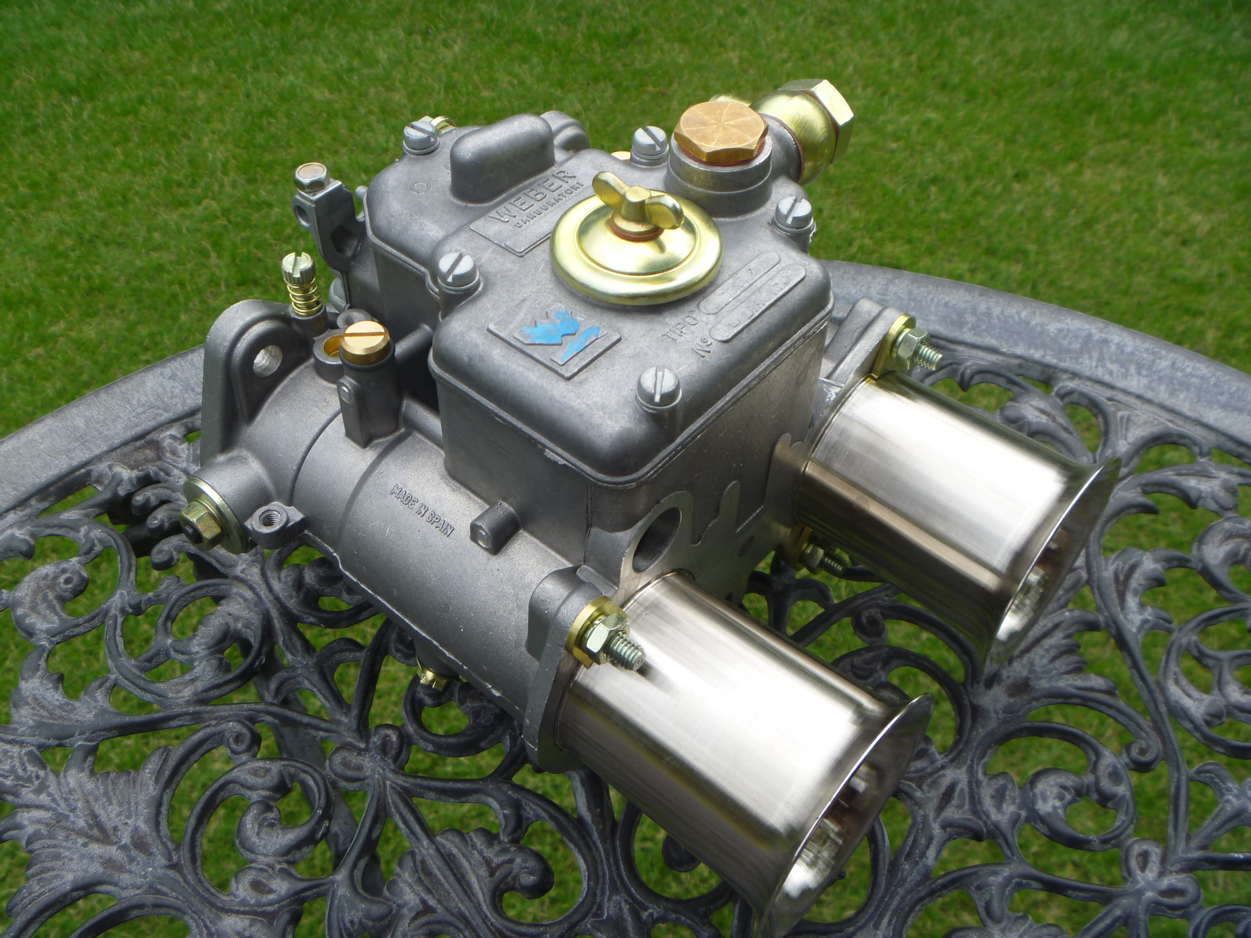 brand new Weber45DCOE9